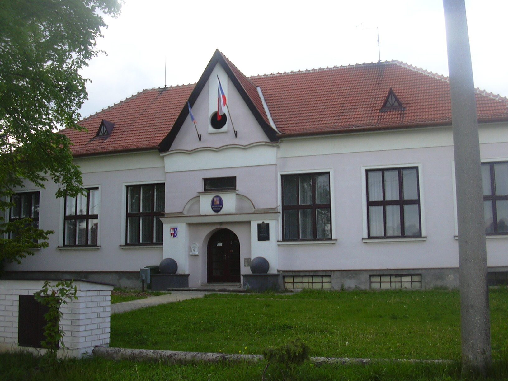 obecní úřad Rybníček (Vyškov- Czech republic)